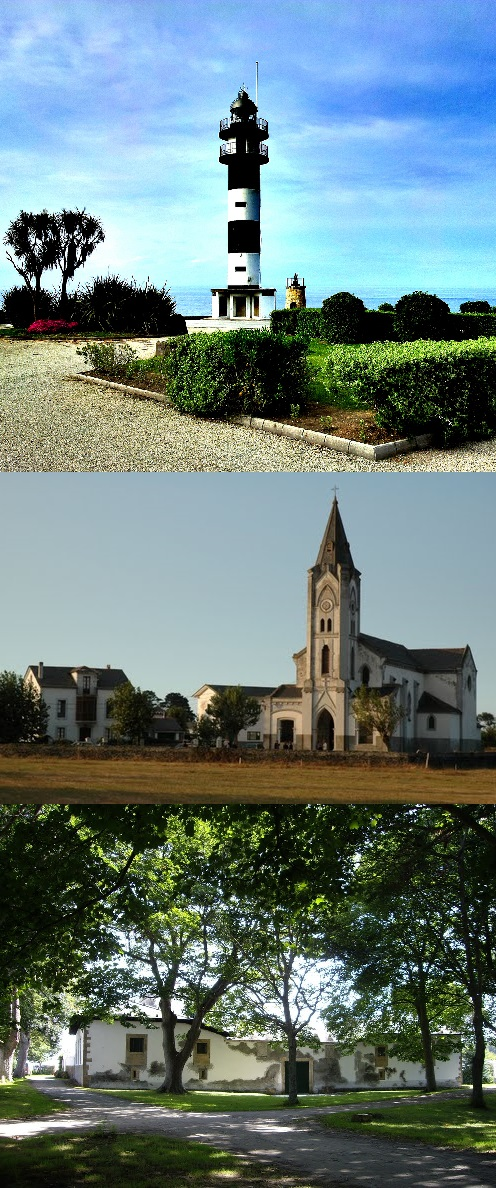 parrquia